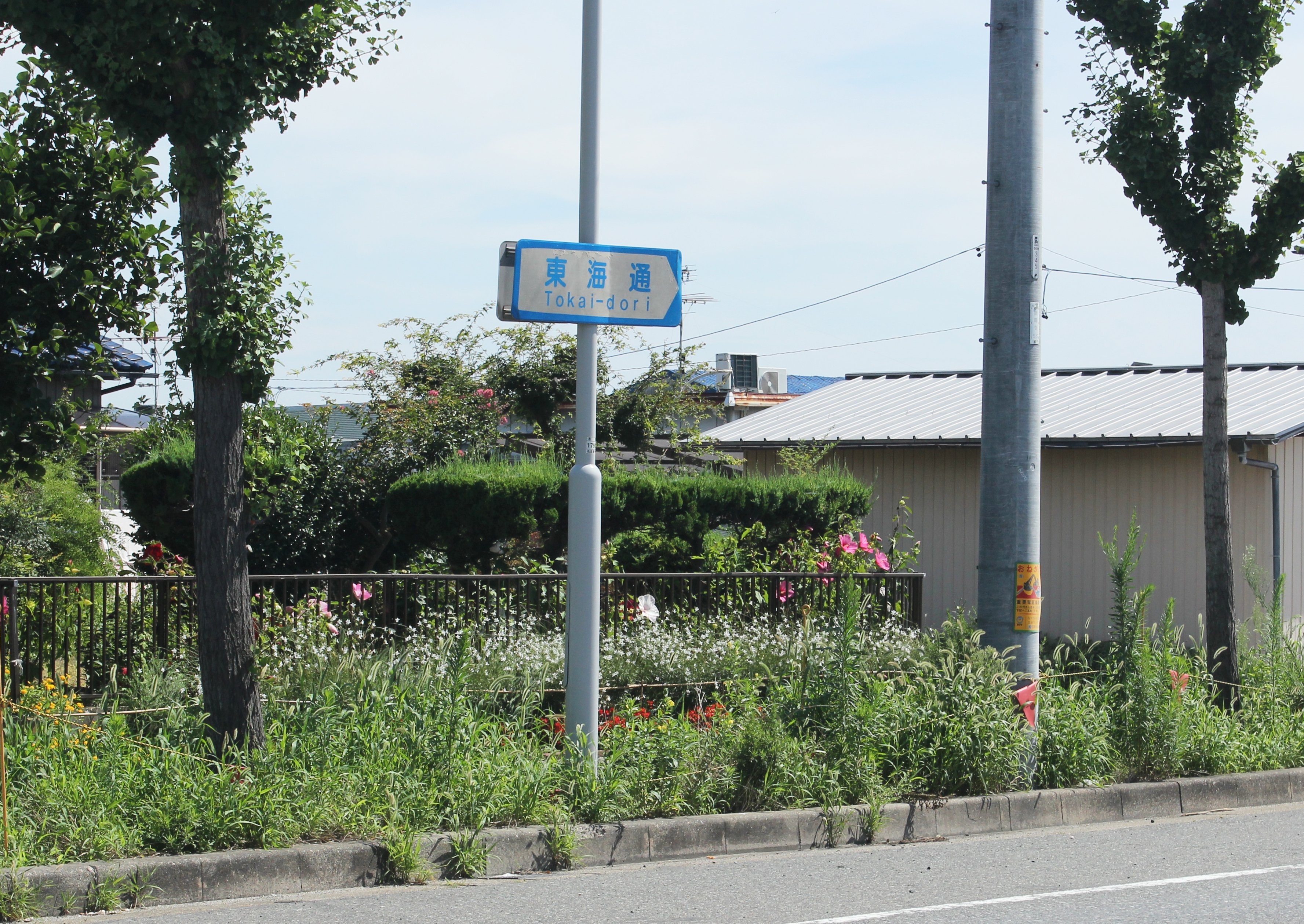 東海通 起点付近の標識